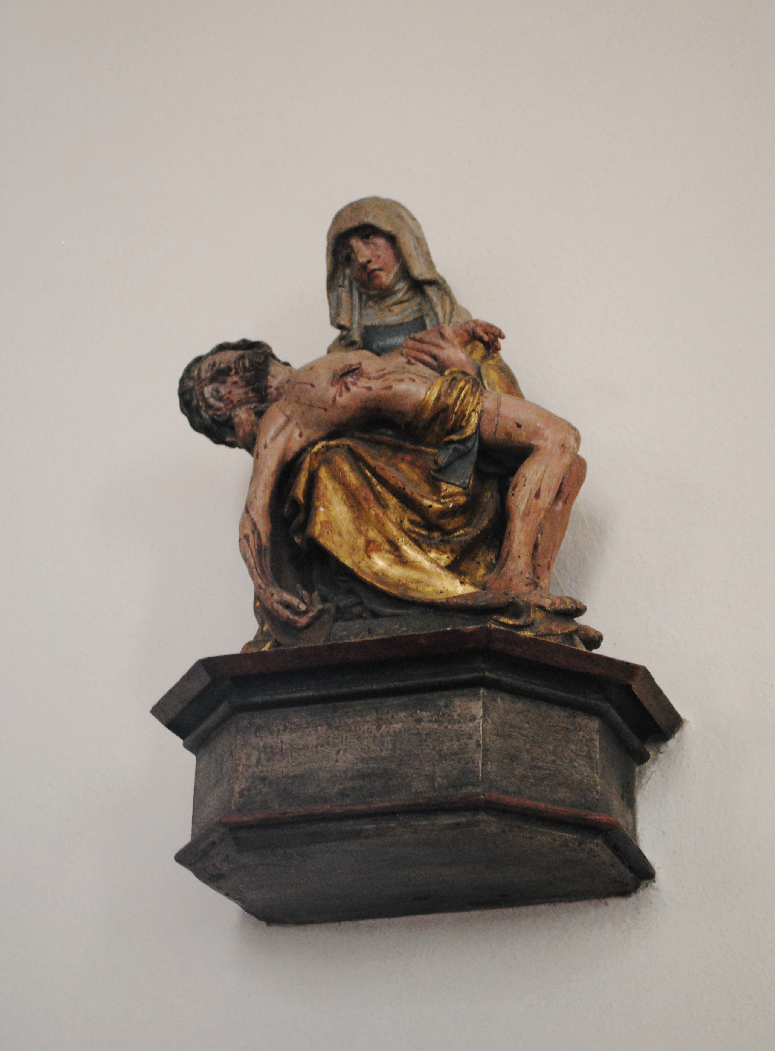 Pieta, Laurentiuskirche, Nordheim am Main